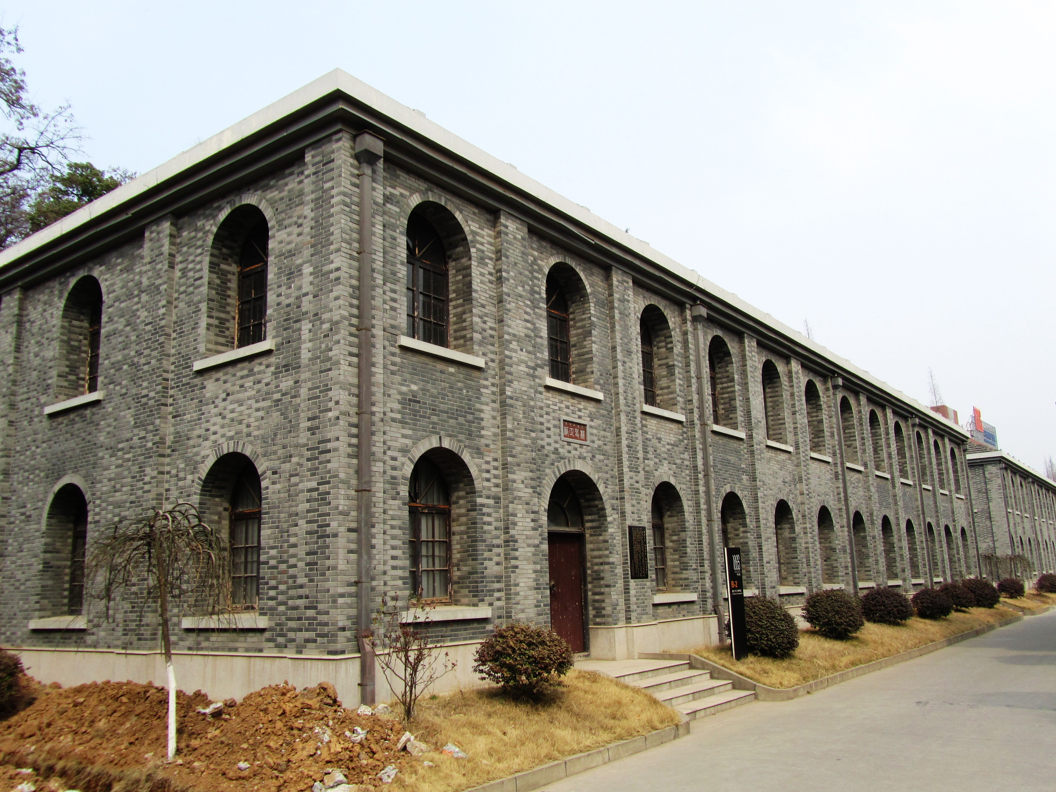 南京金陵机器制造局旧址，图为建于同治四年（1865年）的机器正厂。